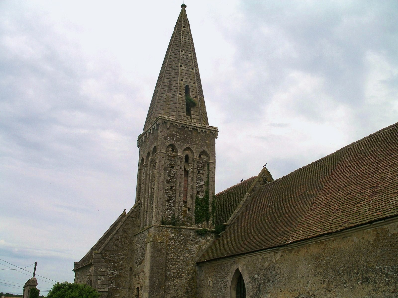 Eglise Paroissiale Saint-Laurent au lieu dit Fontaine-Halbout à Moulines (Calvados)